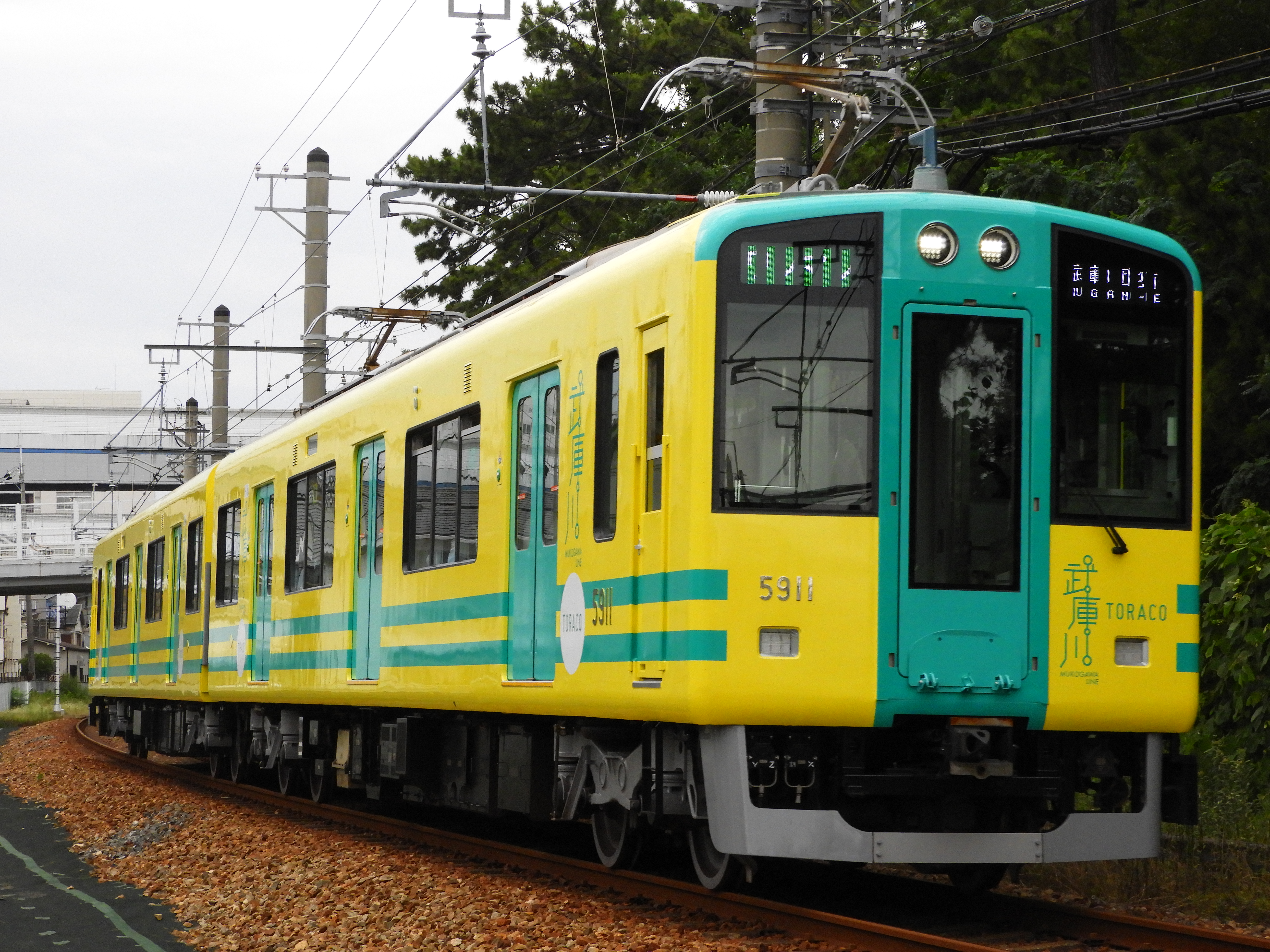 阪神5500系5511F（改造後）「TORACO号」 武庫川線 武庫川～東鳴尾 Nikon Coolpix B700